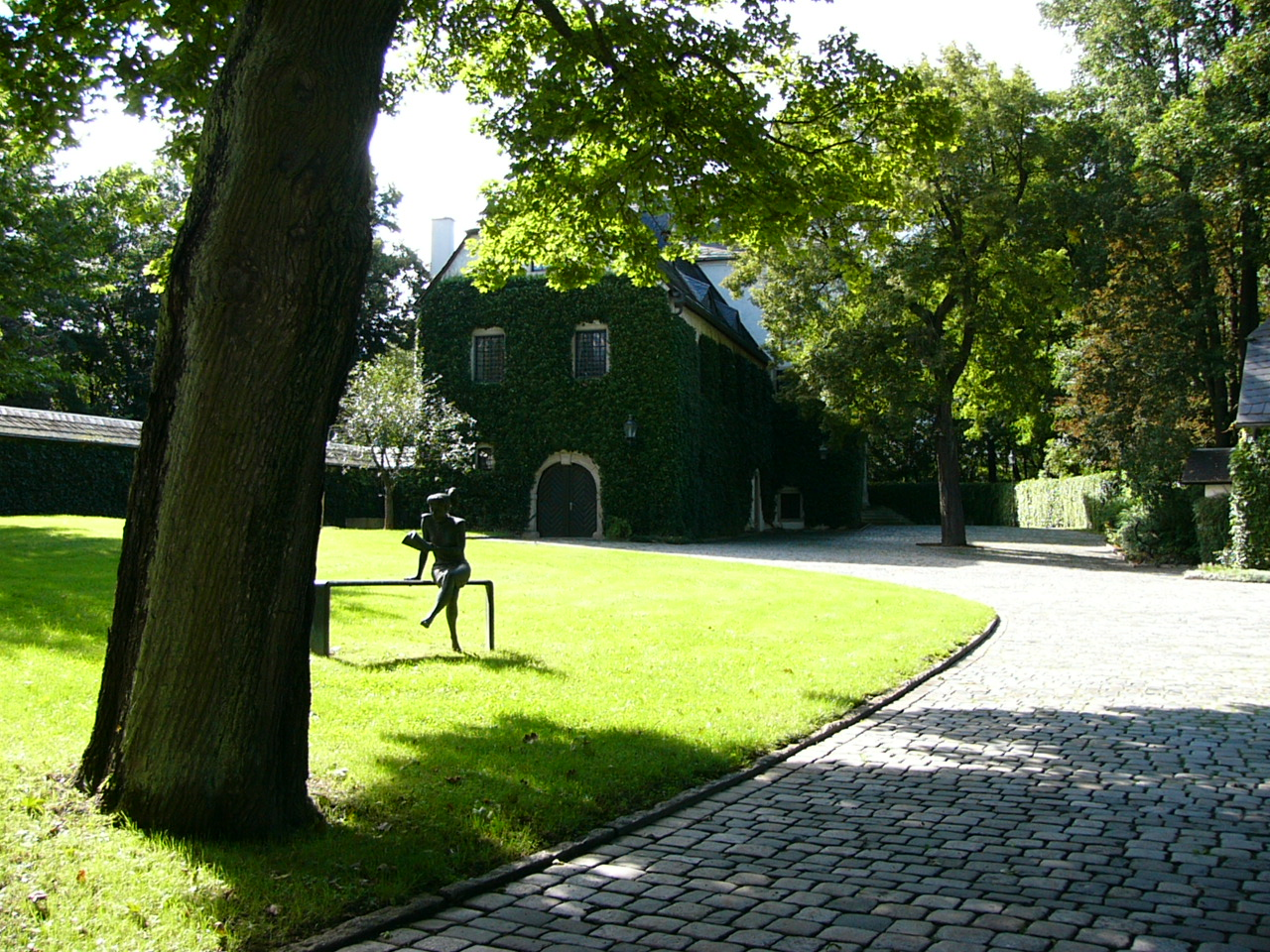 Schloss Hofeck, heute Teil von Hof